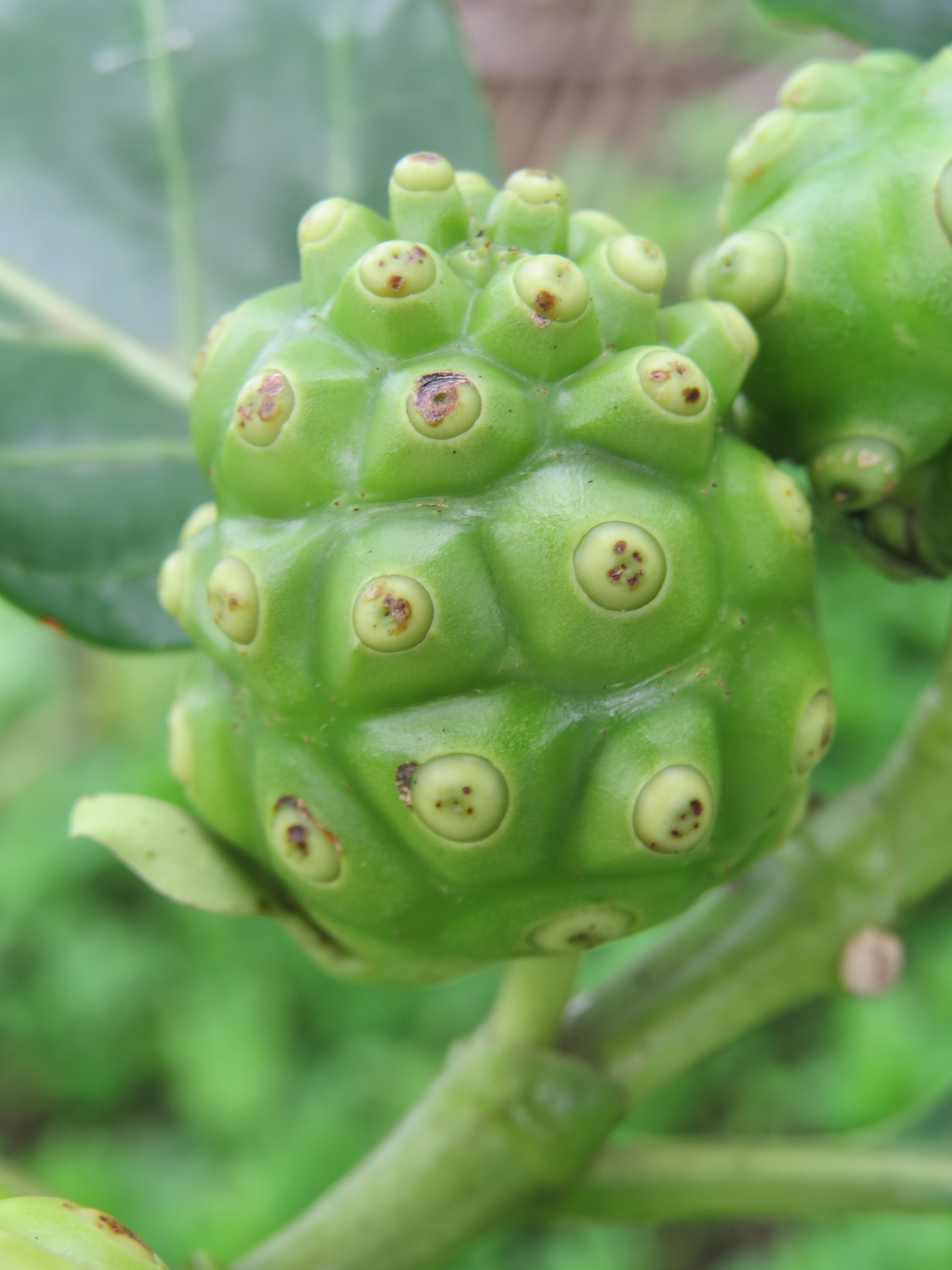 Photos taken at Kavvayi backwaters, Payyannur, Kerala